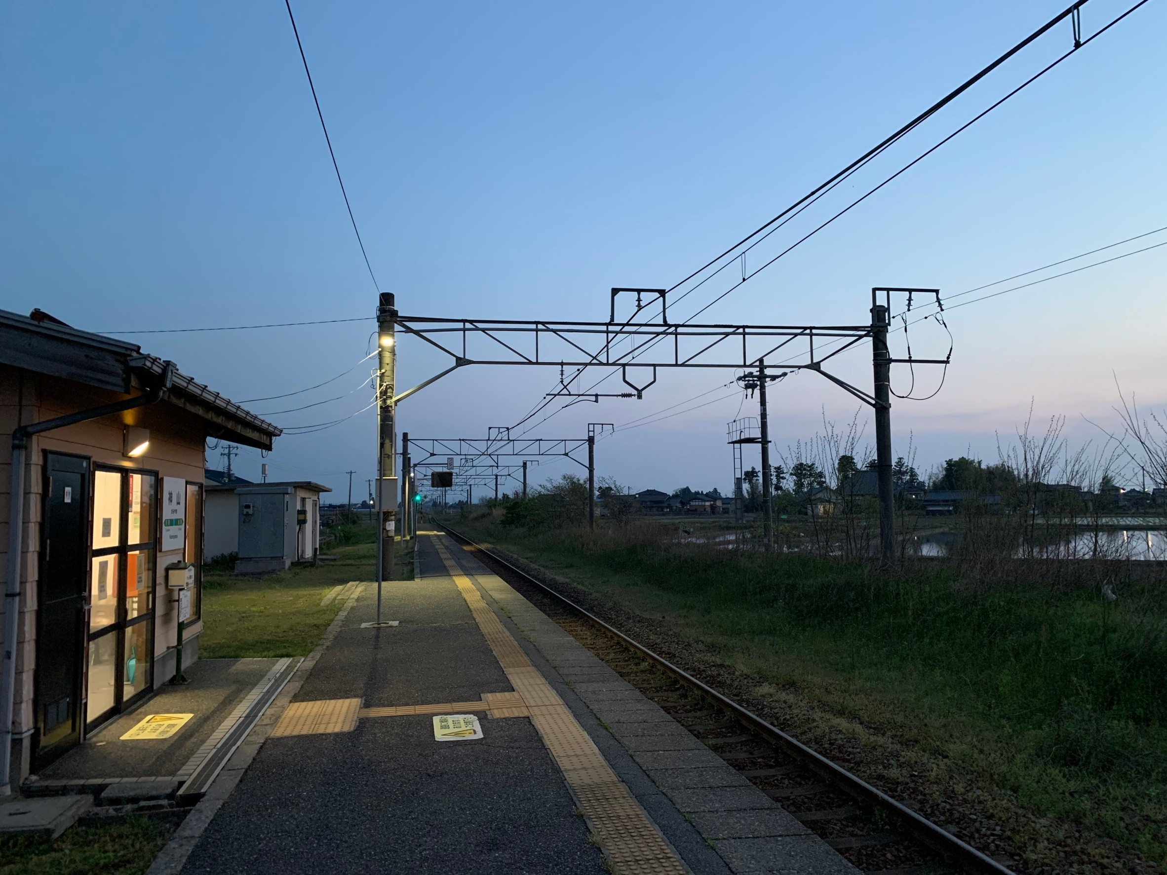 羽越本線神山駅のホーム（2020年5月）